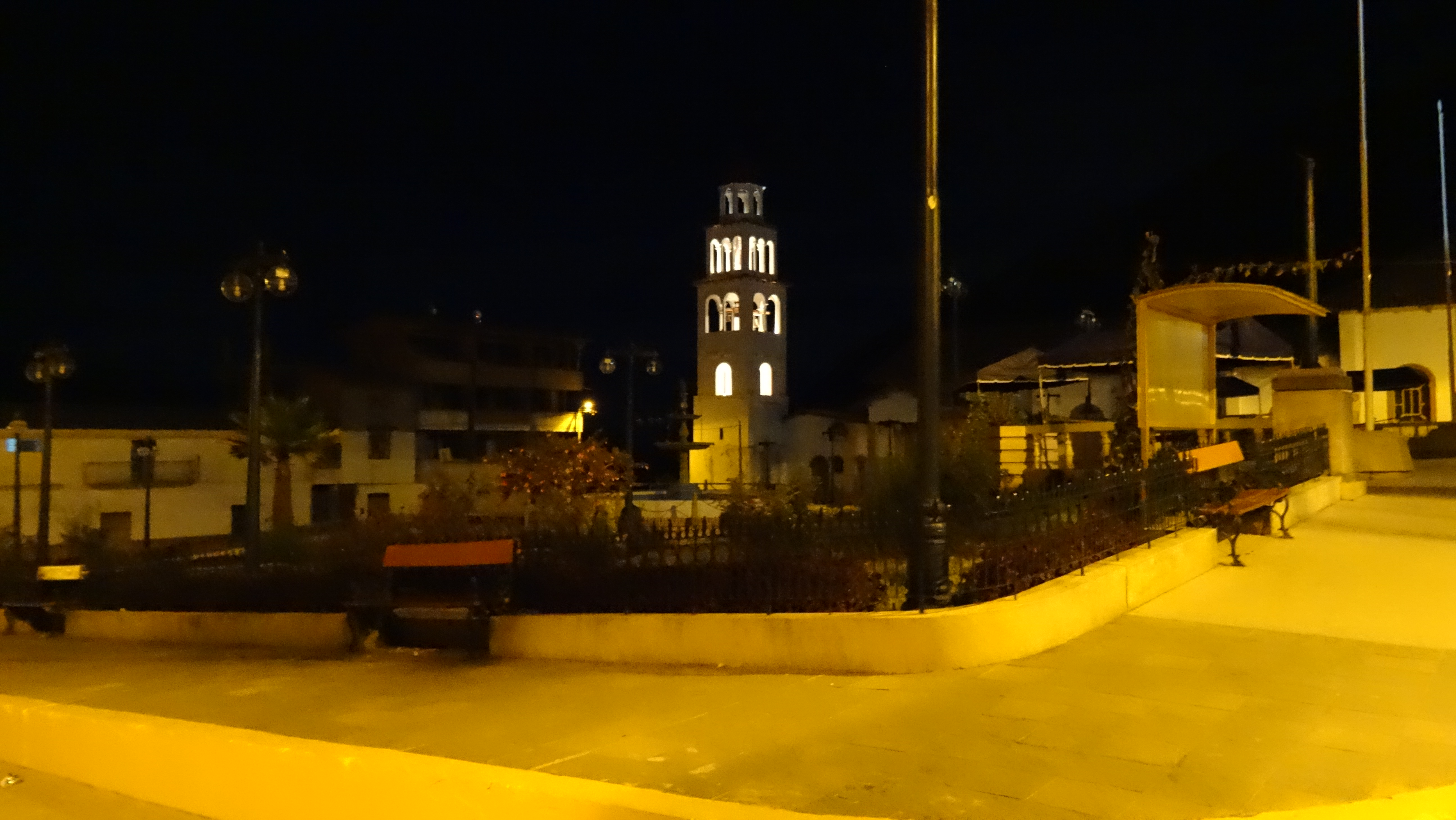 Plaza de Armas en horas nocturnas.